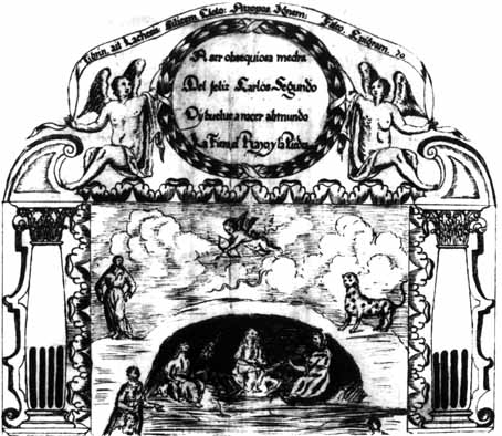 "Telón de boca de la representación de La fiera, el rayo y la piedra de Calderón en Valencia (1690). Según escenografía de Jusep Bayuca y Juan Bautista Gomar. BNM. Ms. 14640".